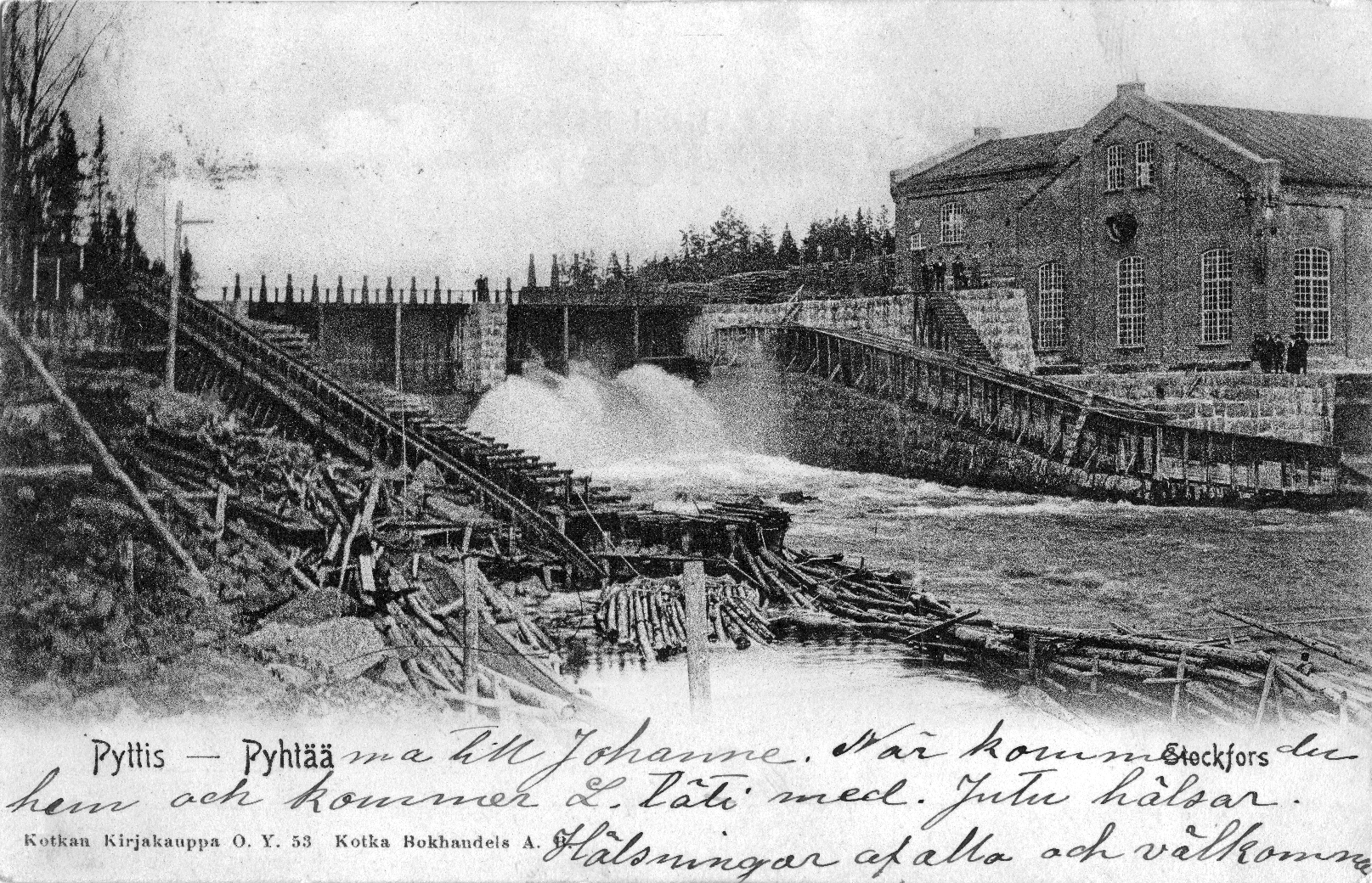 Stockfors träsliperi början av 1900-talet Pyttis (Pyhtää)